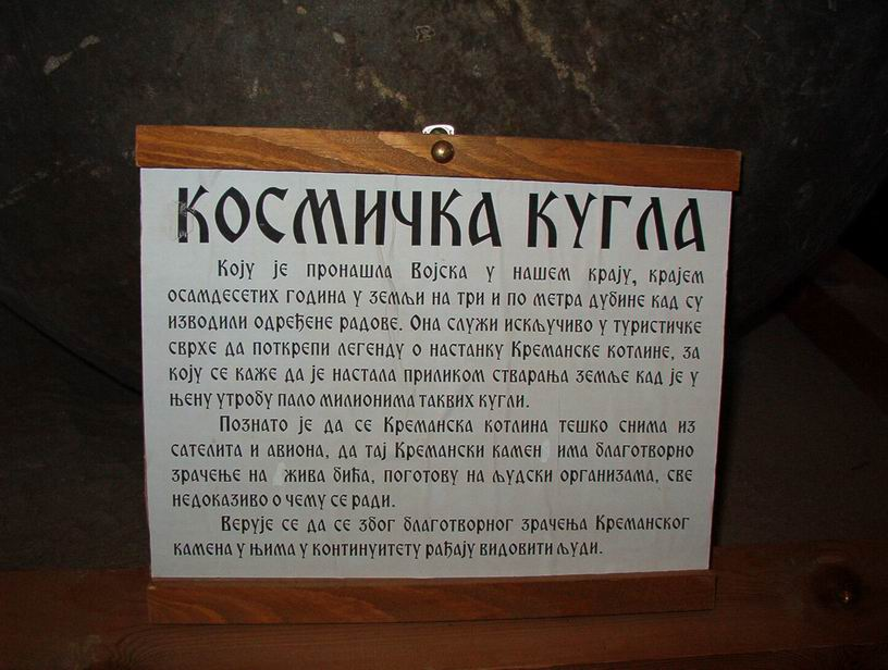 Текст уз Космичку куглу, Кремна на Златибору, Србија Contents 1 Summary 2 Licensing 3 Licensing 4 Original upload log Summary Космичка кугла из Кремана на Златибору, Србија Licensing Fotografisao Goldfinger. U javnoj upotrebi! Категорија:Слике Златибора Категорија:Слике Таре